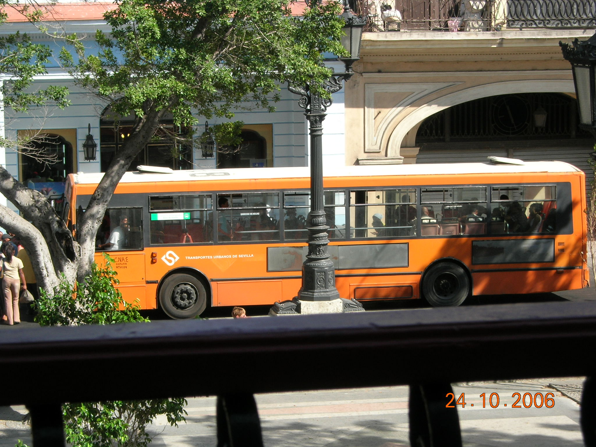 Urban bus, Havana, Cuba